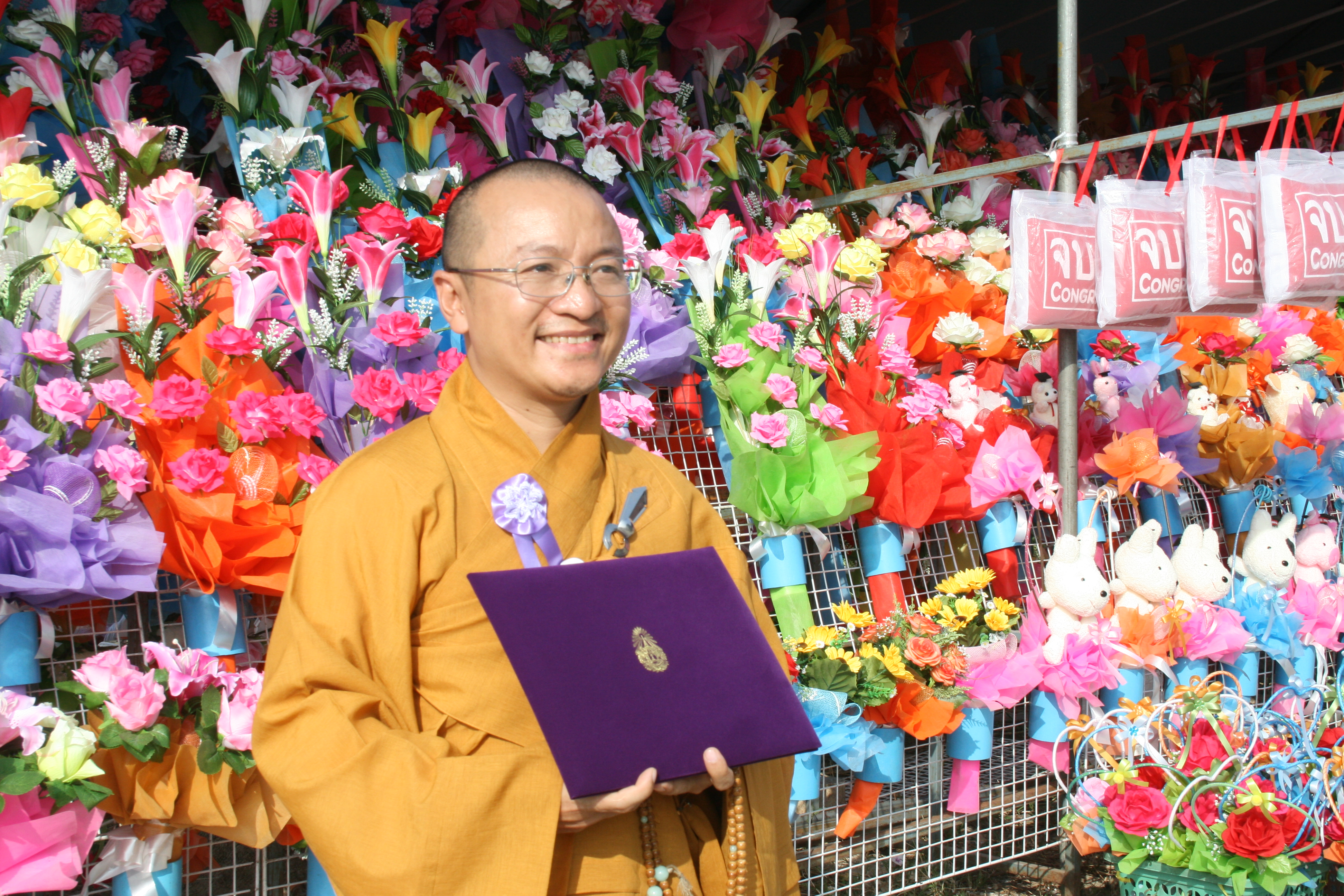 TT. Thích Nhật Từ nhận bằng tiến sĩ danh dự của trường đại học Mahamakut - Thái Lan trao ngày 28-11-2010.